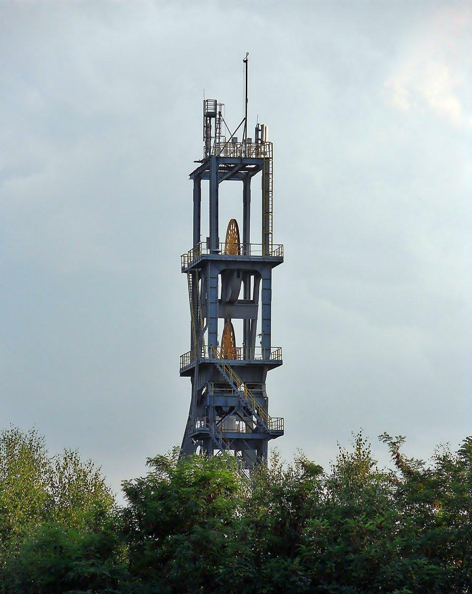 Kopalnia Węgla Kamiennego "Halemba - Wirek" Ruch "Wirek", Szyb Nowy Wirek. Widok od strony Góry Hugona.